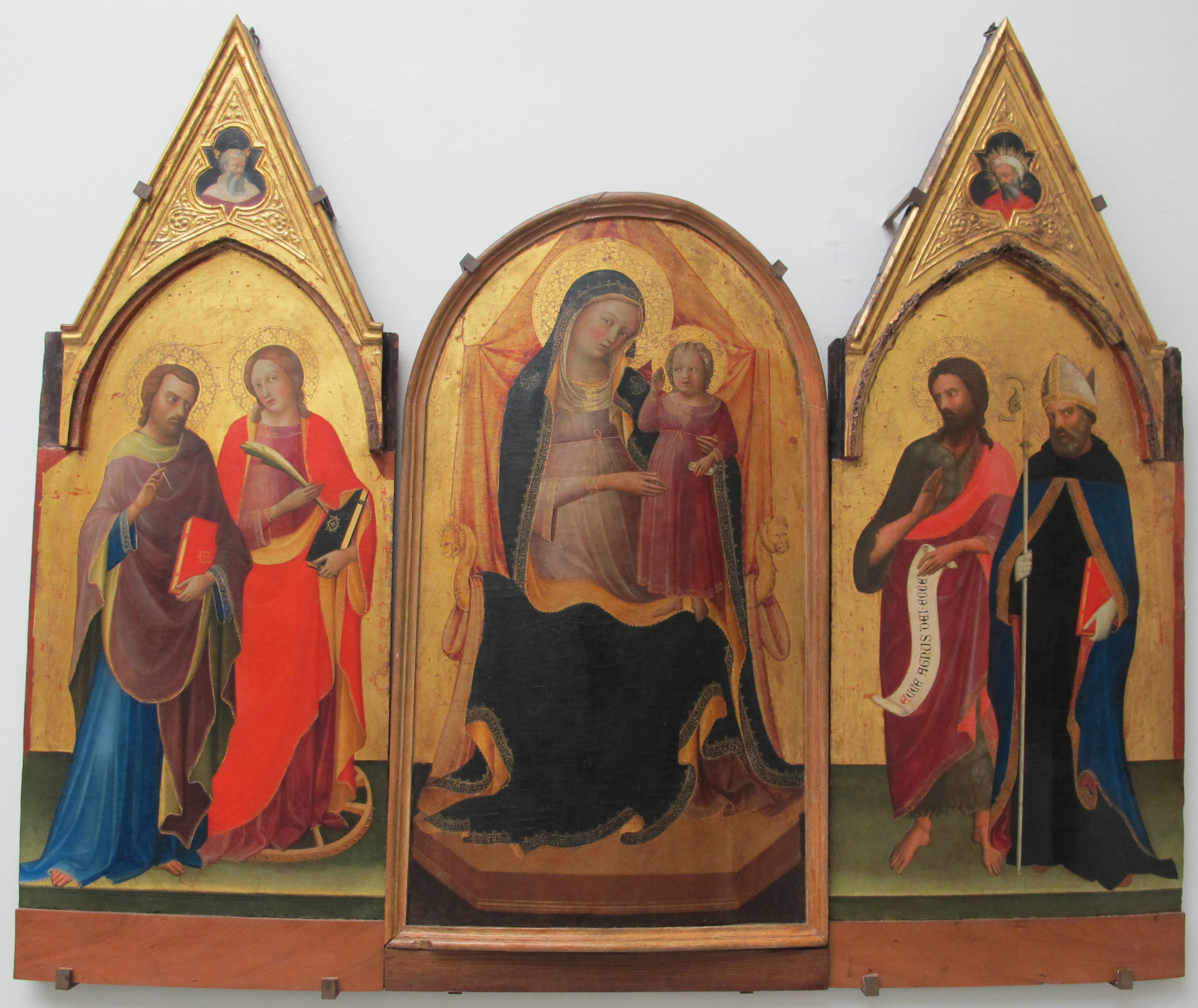 Lorenzo monaco e paolo schiavo, madonna e santi, da collegiata di empoli